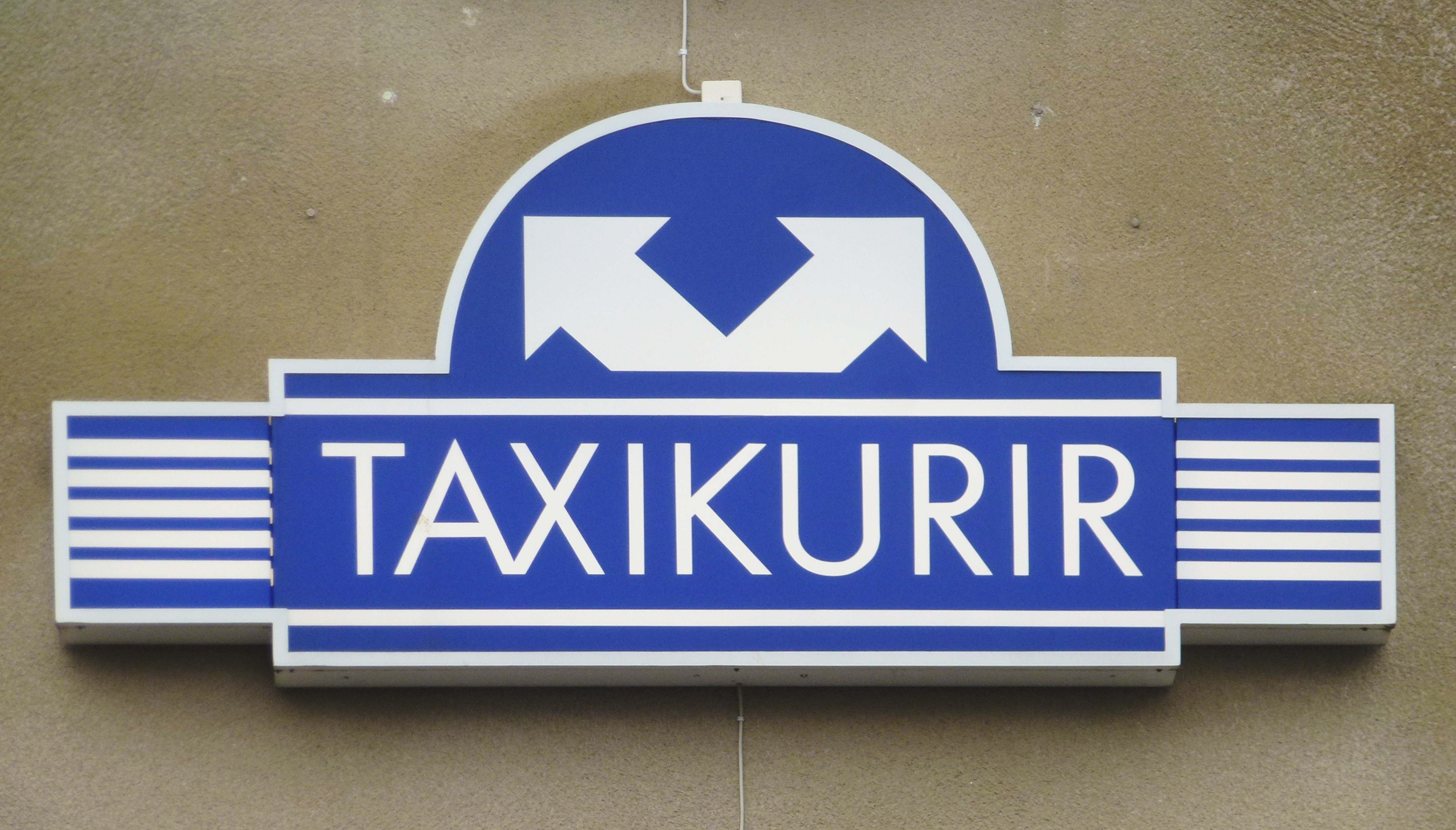 Taxikurir, skylt i Hägerstens industriområde